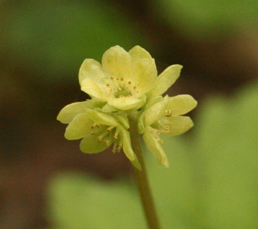 Adoxa moschatellina - piżmaczek wiosenny